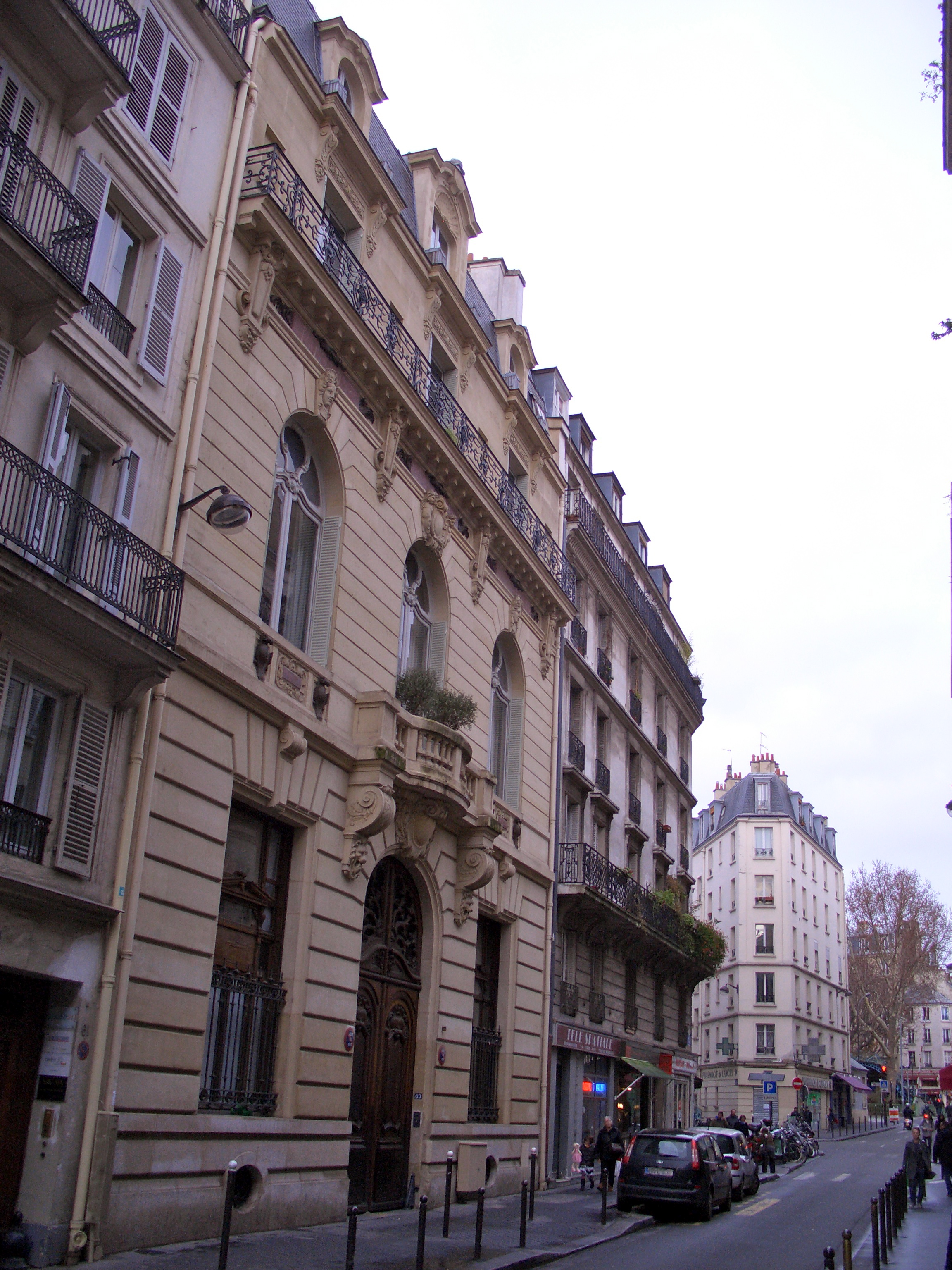 Rue de Lancry